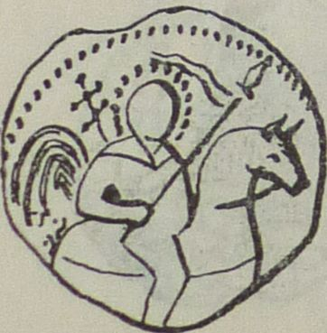 Ездец Мстислава Удатного